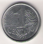 Frente da moeda de 1 centavo da primeira geração. This graphic was created with GIMP.